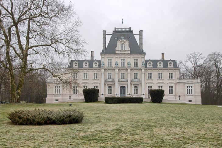 Zakrzewo Pałac Albina Węsierskiego